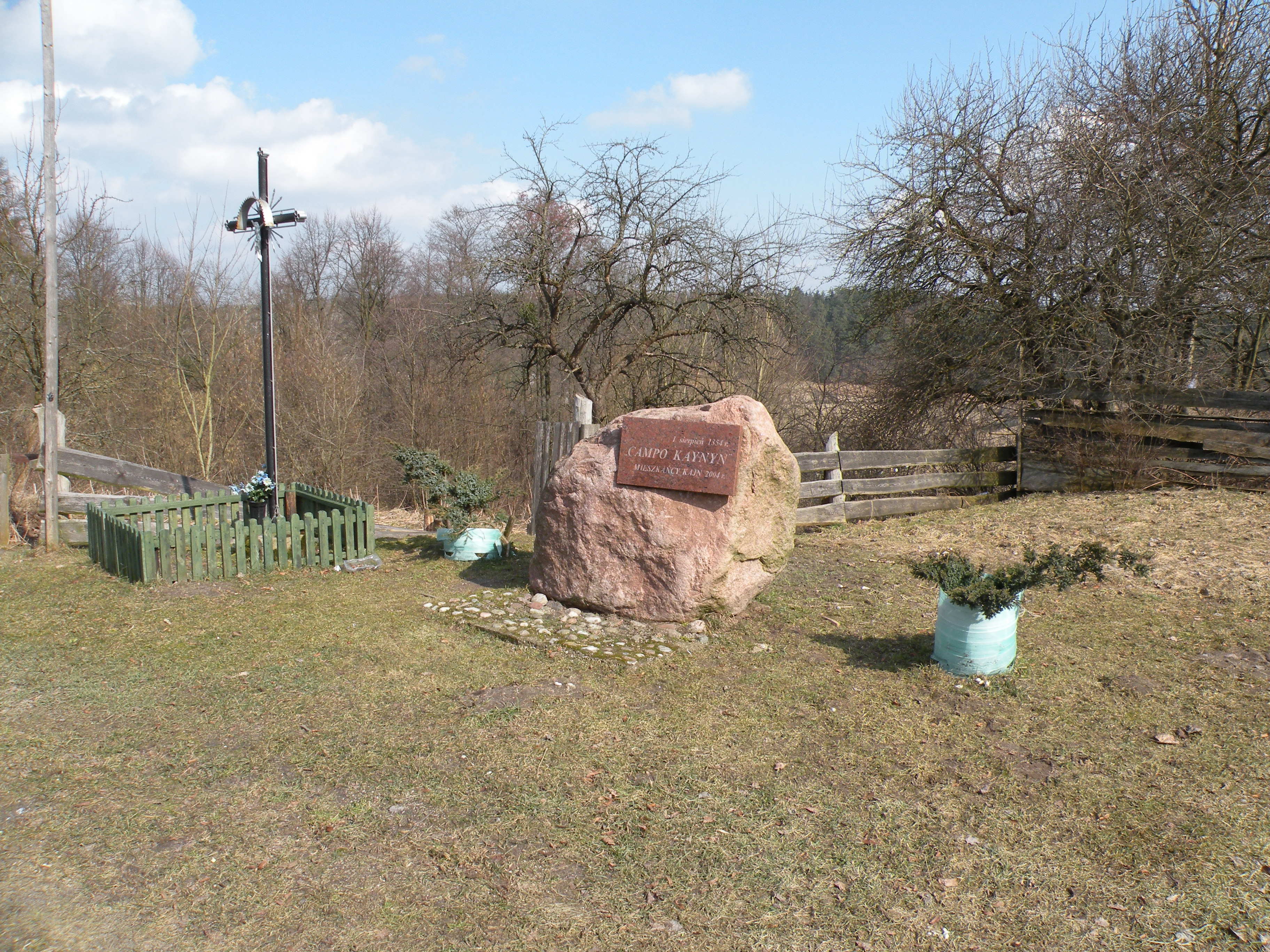 Głaz pamiątkowy z taklica z okazji 650-lecia wsi